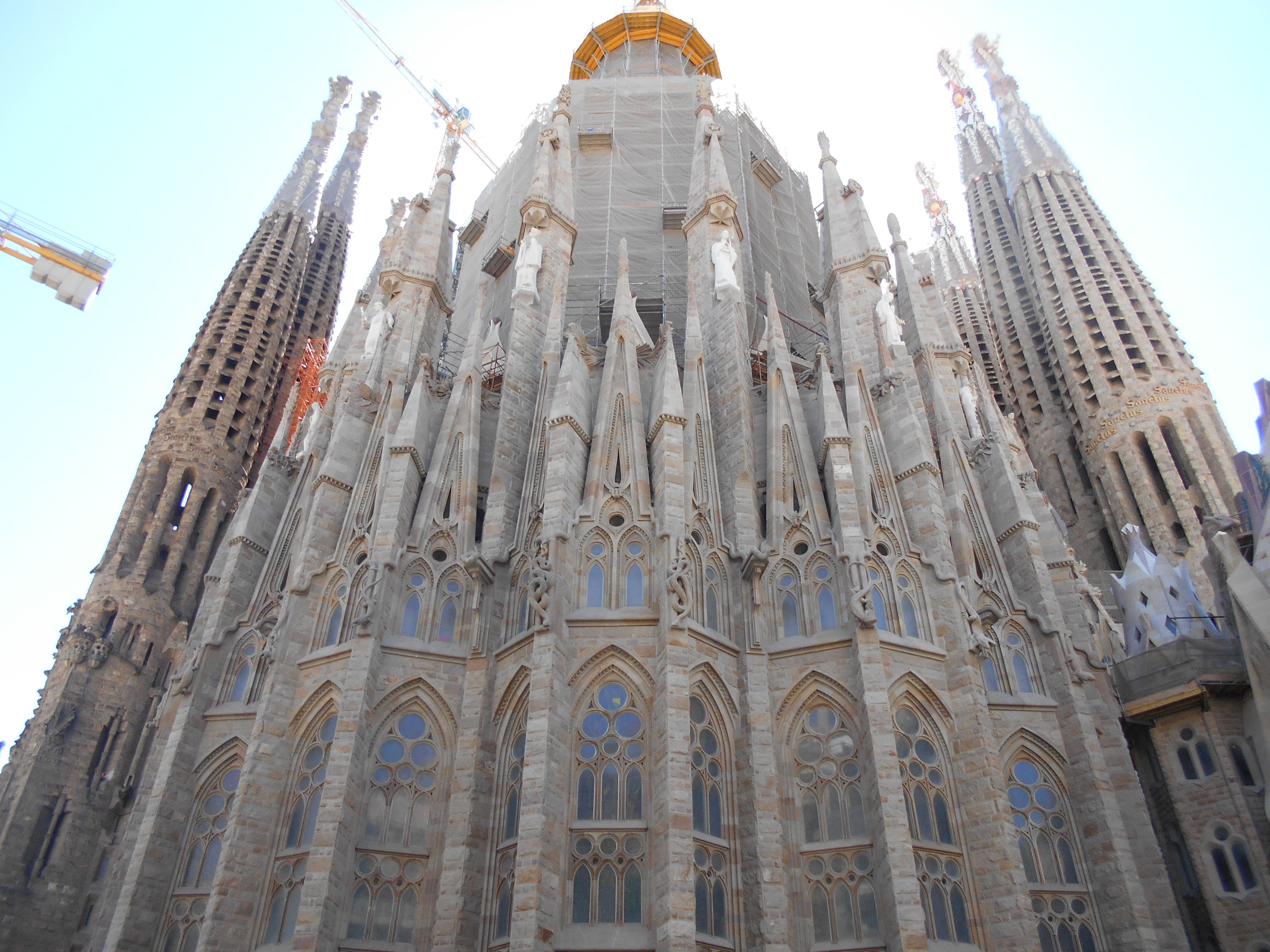 Ábside de la Sagrada Familia.